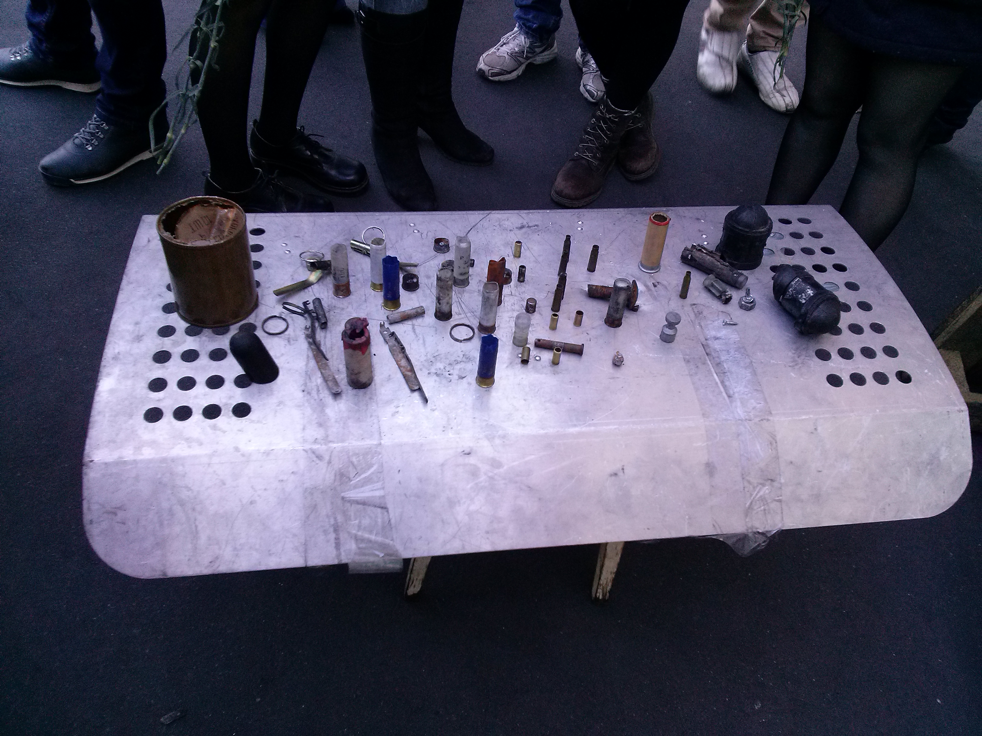 Кулі та рештки гранат, що використовувалися на Євромайдані. Вул. Грушевського, Київ